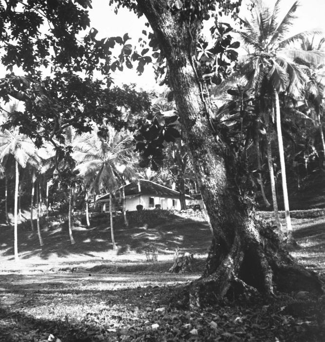 Foto. Pasanggrahan bij Karang Hawoe aan de Wijnkoops-baai